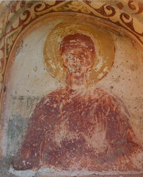 „Свети Атанасиј“, село Дреновци: Остатоци од живописот.